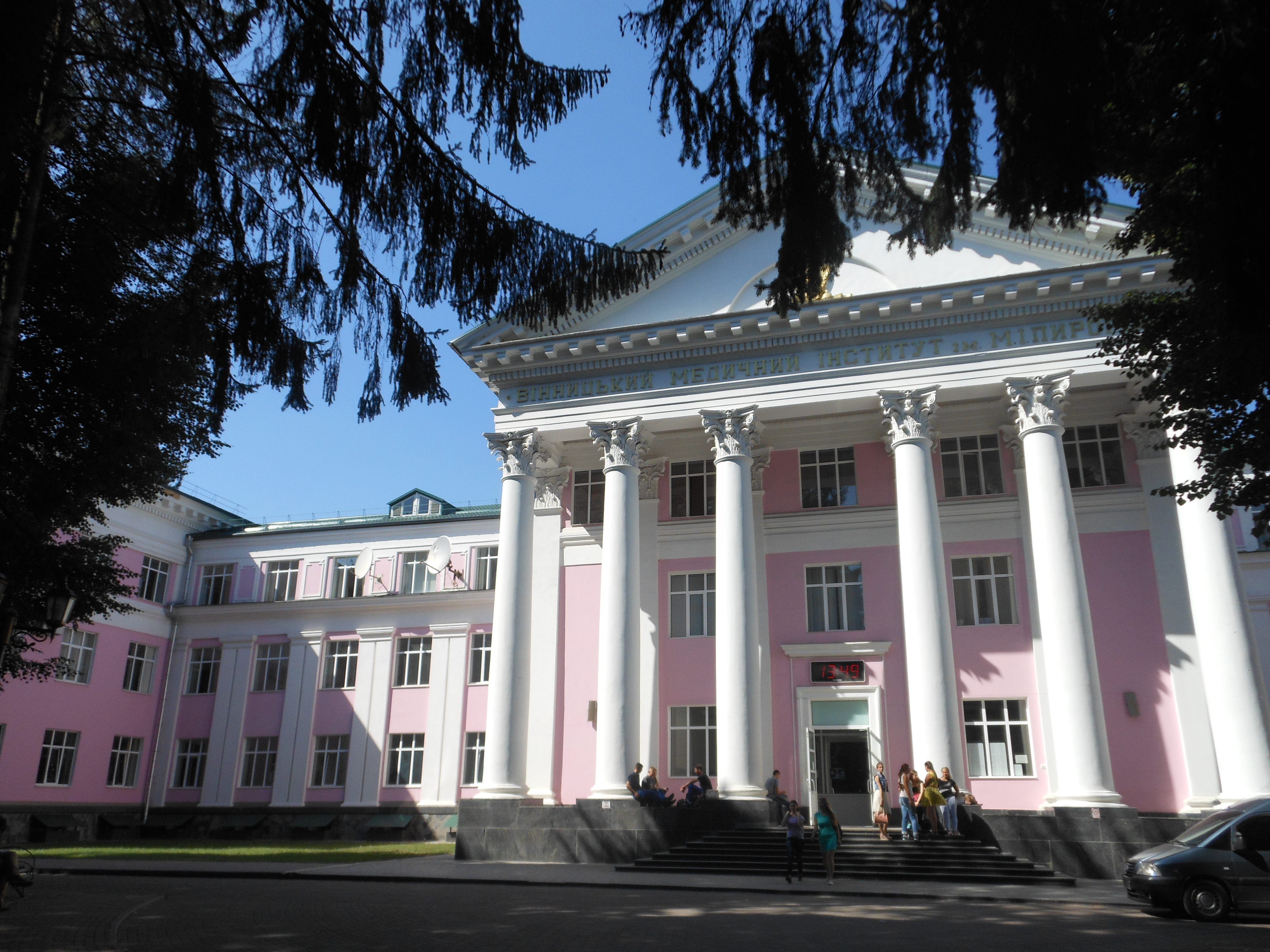 Медуніверситет (Головний корпус), Вінниця, вул. Пирогова, 56